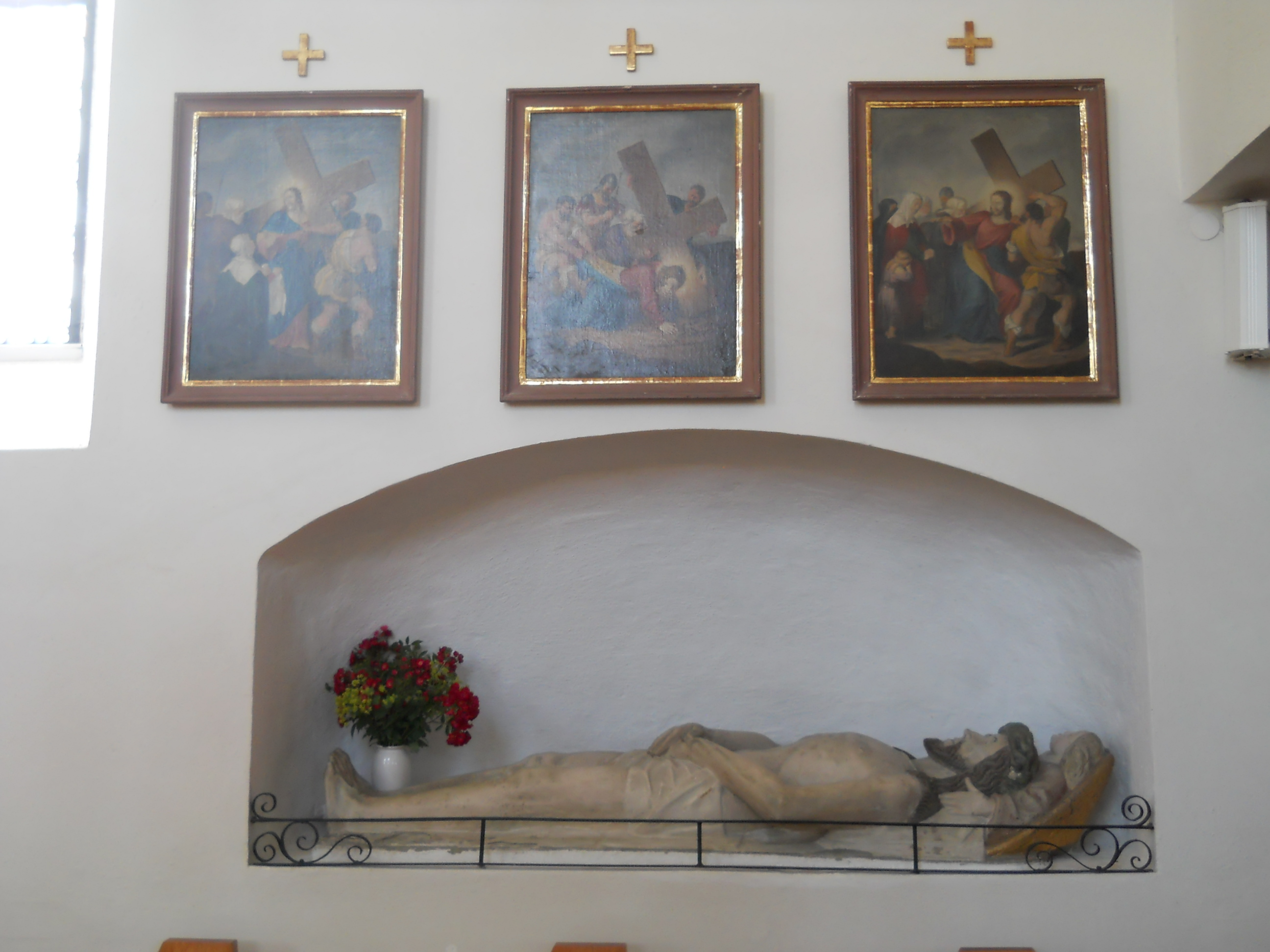 Rauenzell, Ortsteil von Herrieden im Landkreis Ansbach (Bayern), Kath. Pfarrkirche Mariä Heimsuchung, Christus im Grab aus der ehem. Wallfahrtskirche St. Salvator